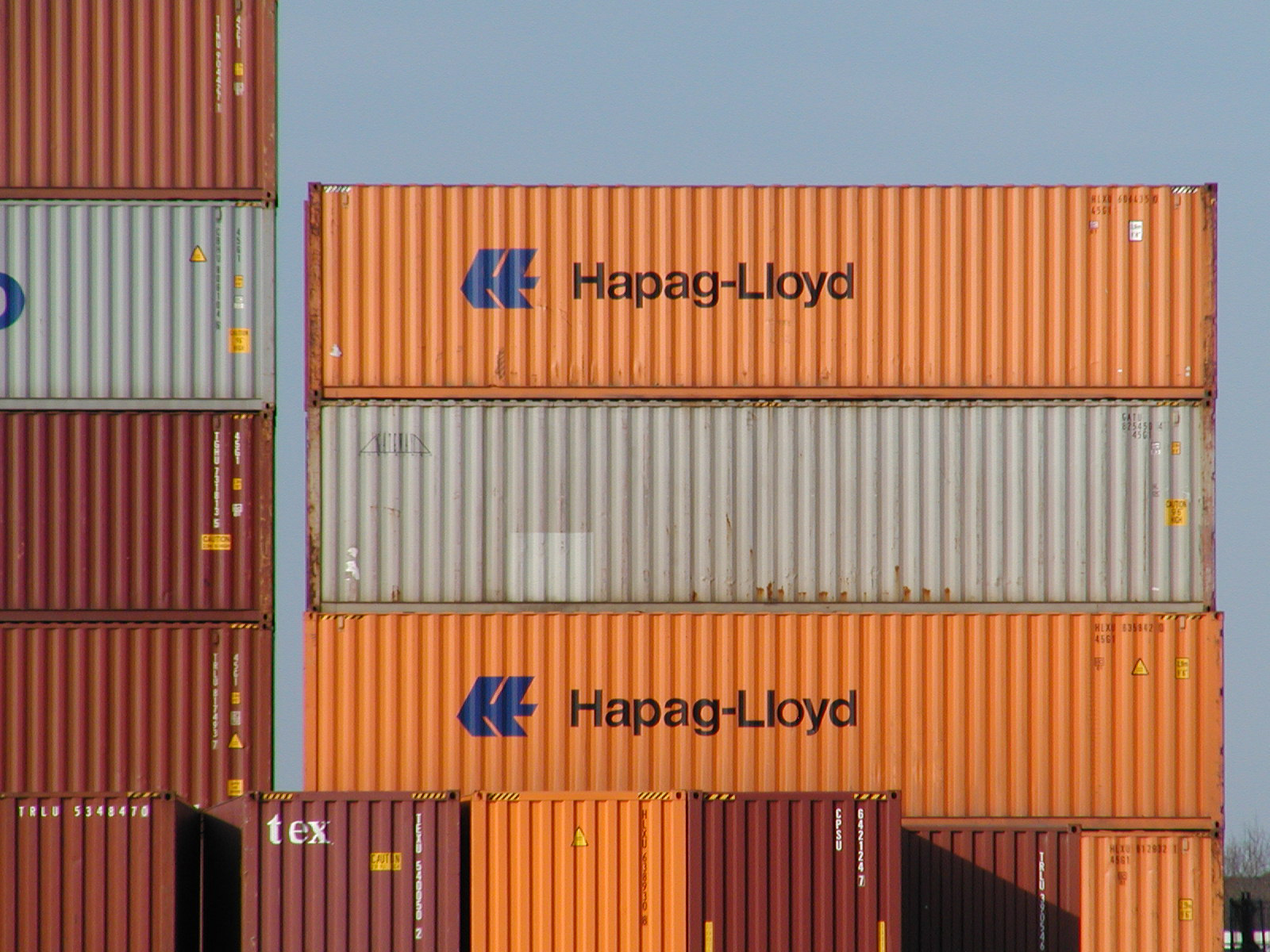 Zwei Container der Hapag-Lloyd